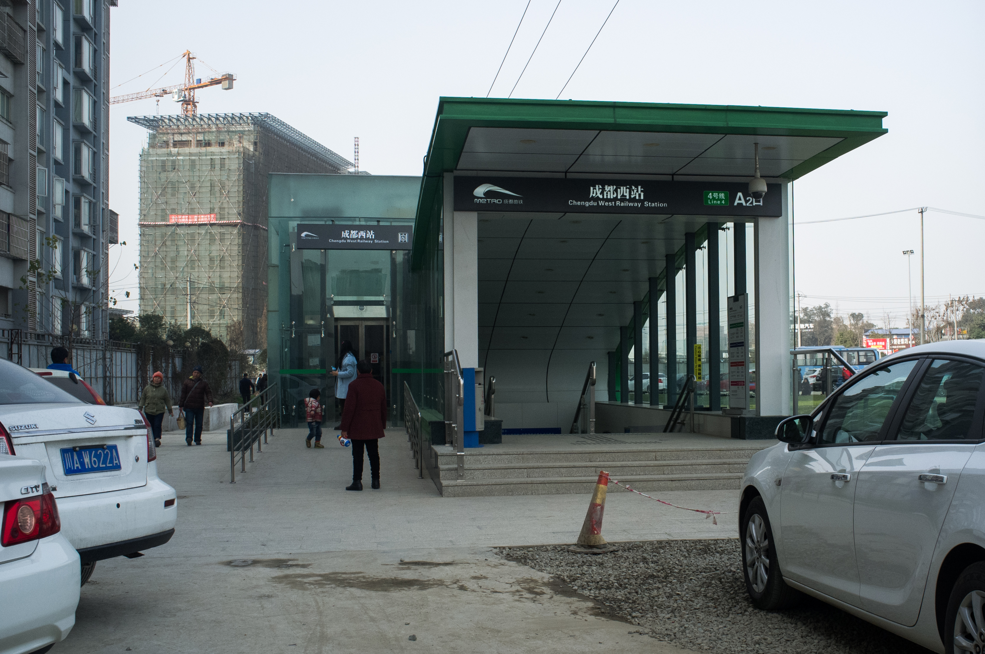 地铁成都西站出口